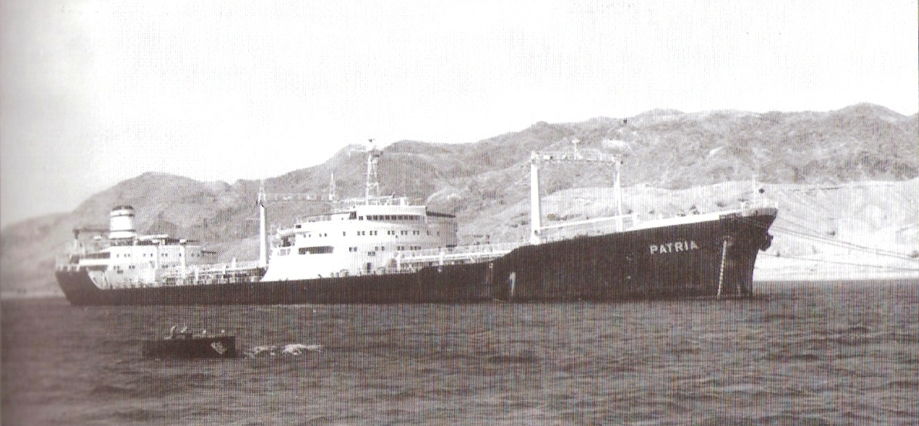 מיכלית המביאה דלק מאבו רודס לאילת